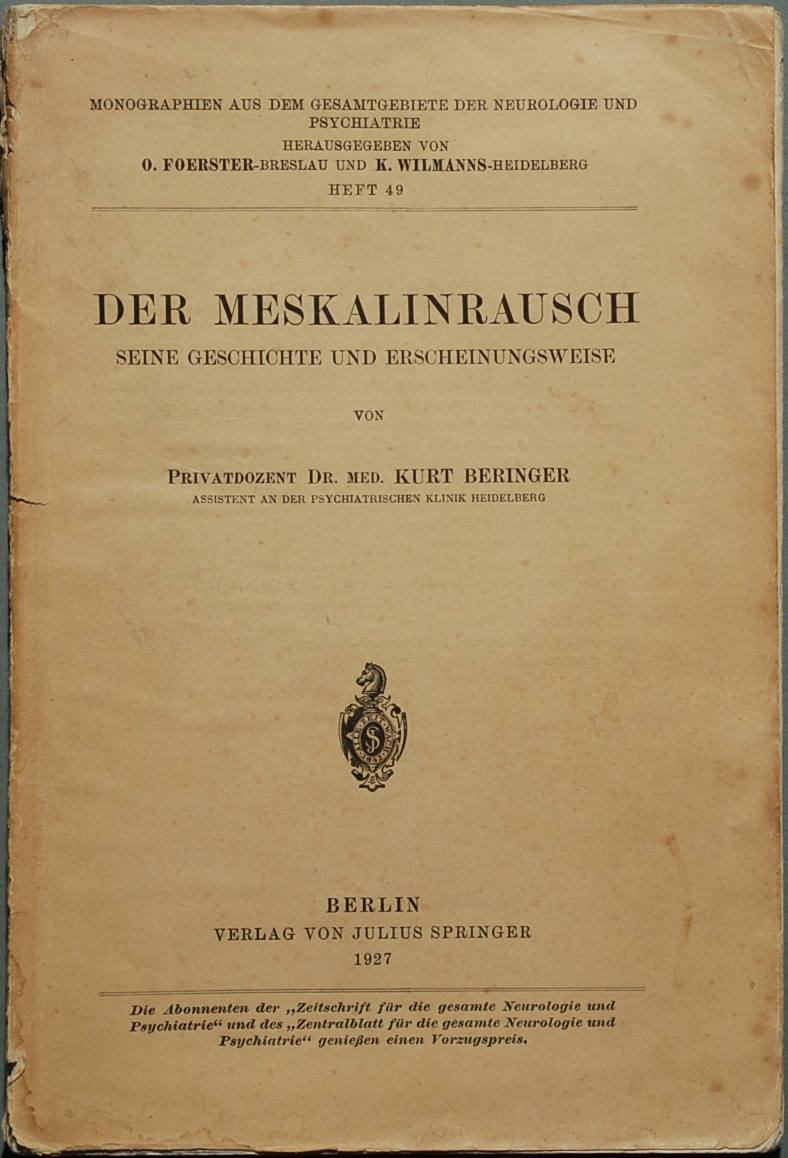 Beringer, Kurt: Der Meskalinrausch 1927, Erstdruck.